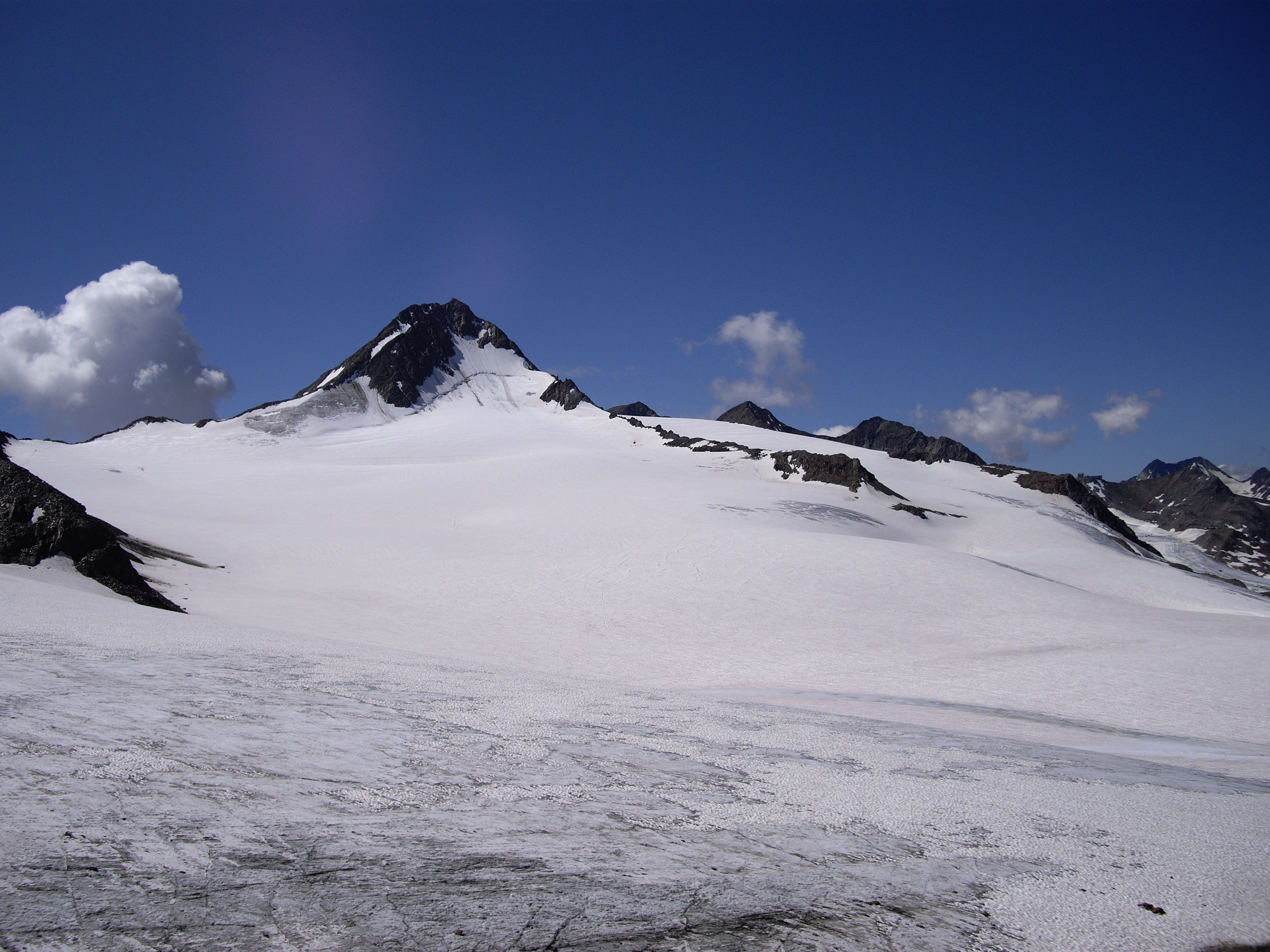 Gipfel der Fineilspitze